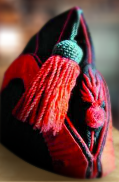 Ancien modèle de bonnet de police à gland rouge, XIXe siècle (Sapeur pompier)